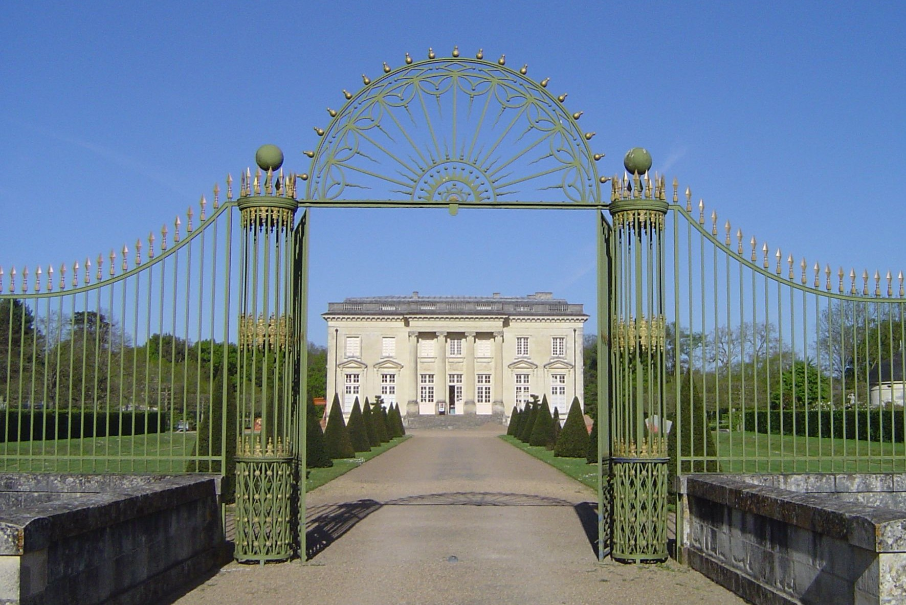 Cour d'honneur du château